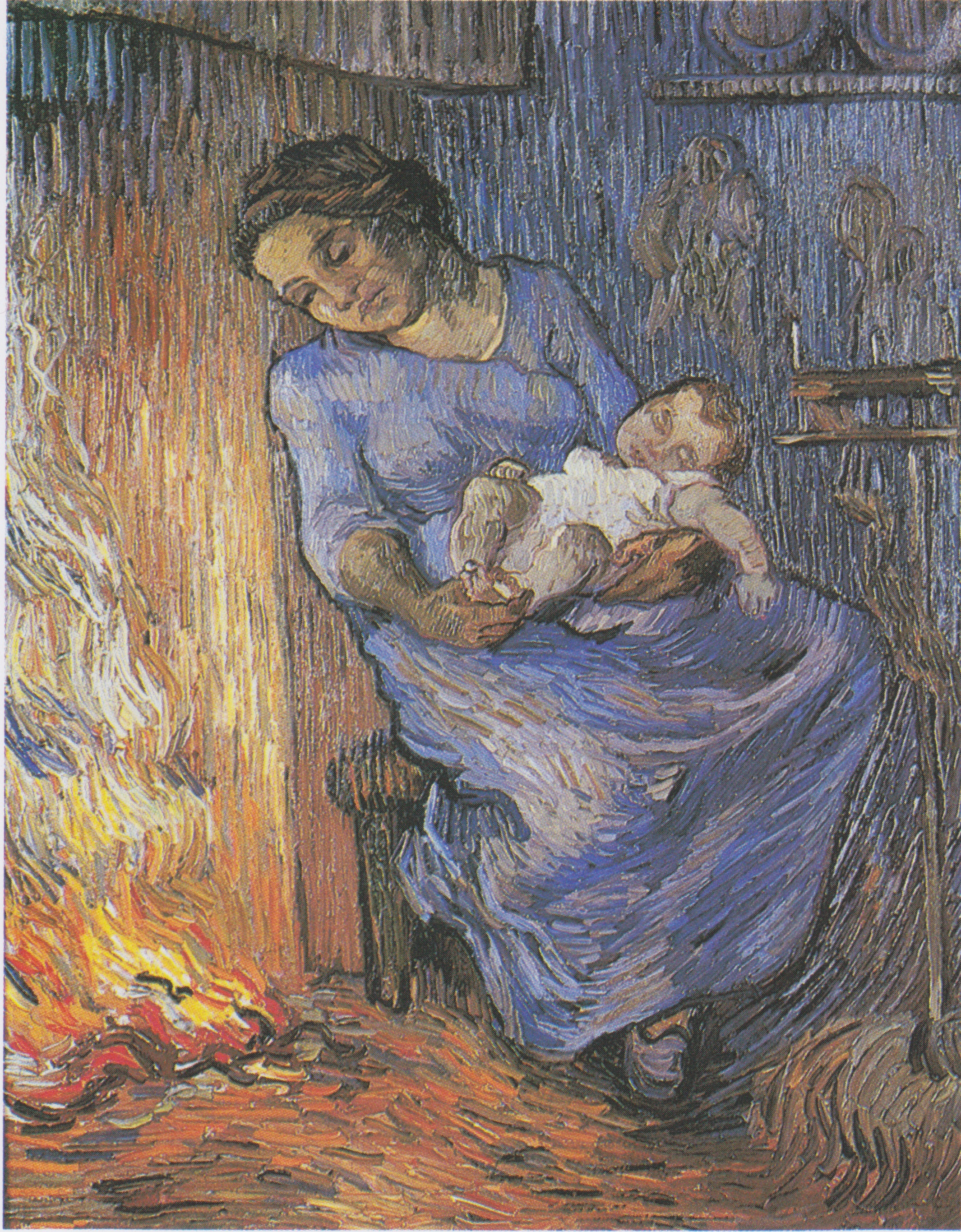 nach einer Schwarz-Weiss-Abbildung in Le Monde illustré von: Virginie Demont-Breton: L'homme est en mer